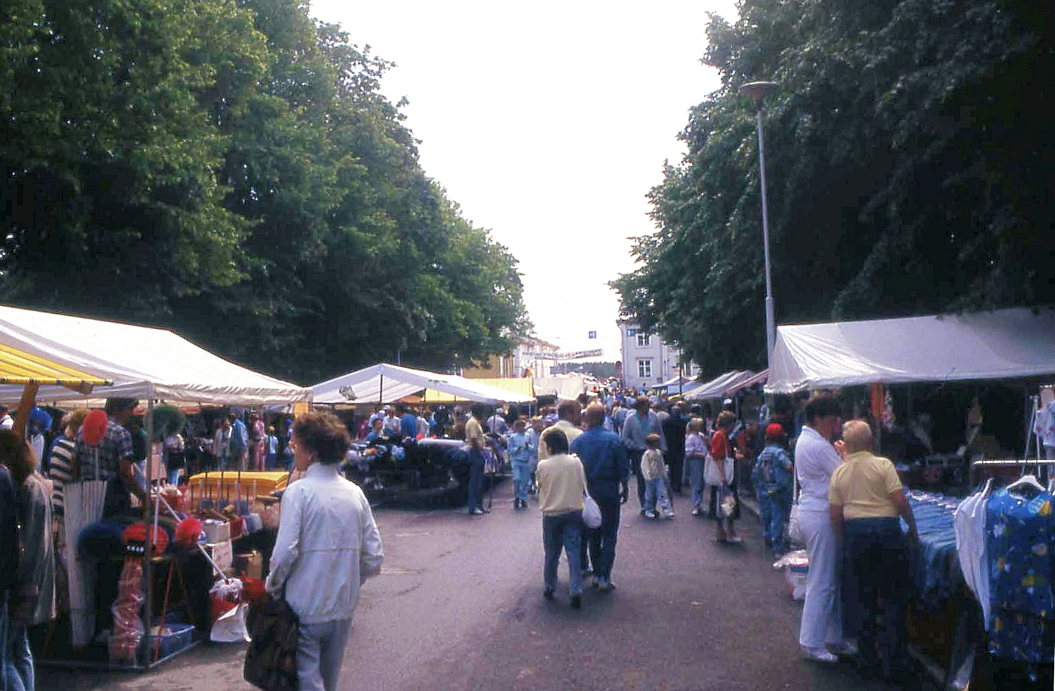 Kristiinakaupungin markkinat vuonna 1989